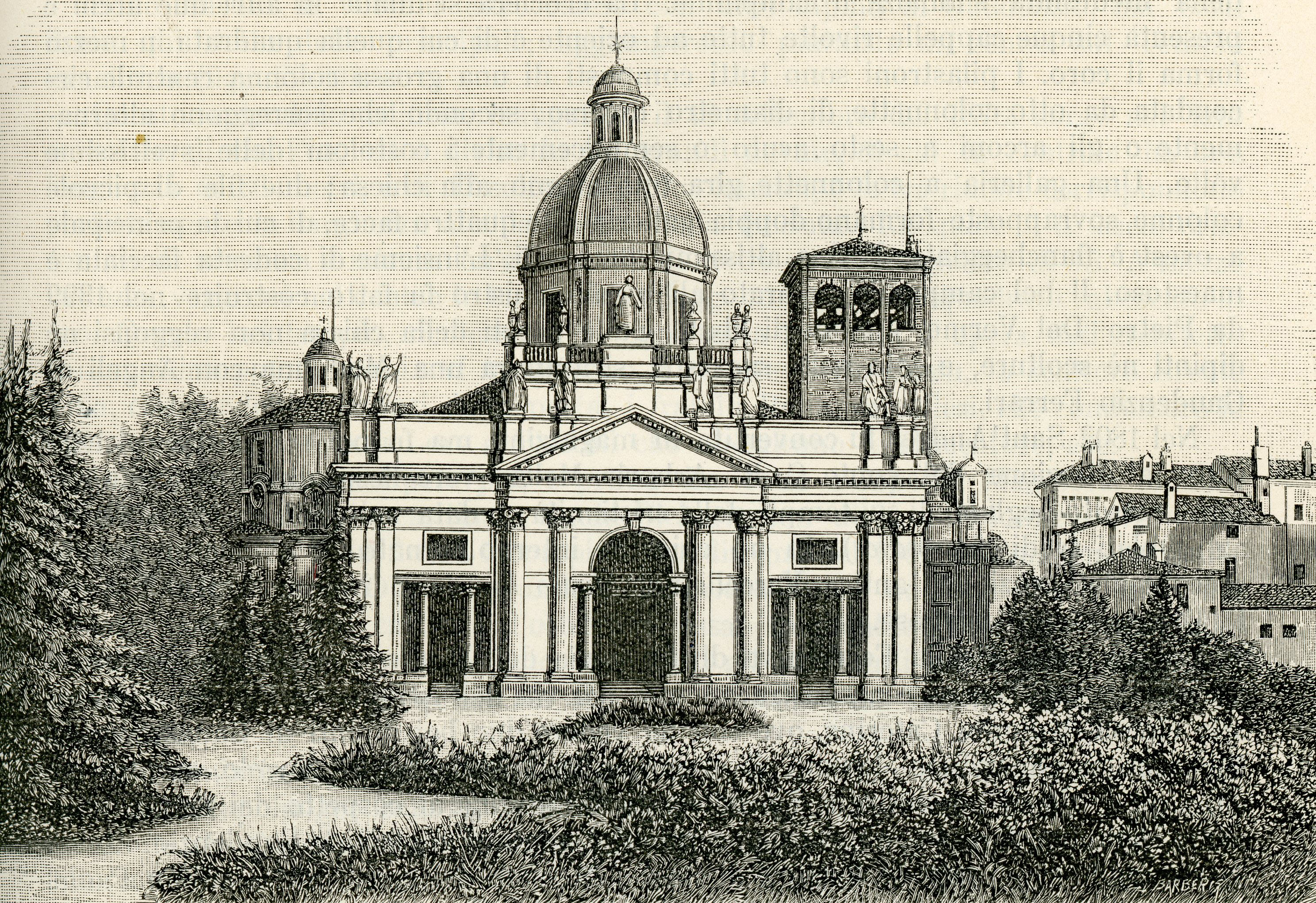 Duomo di Vercelli, (xilografia di Barberis)